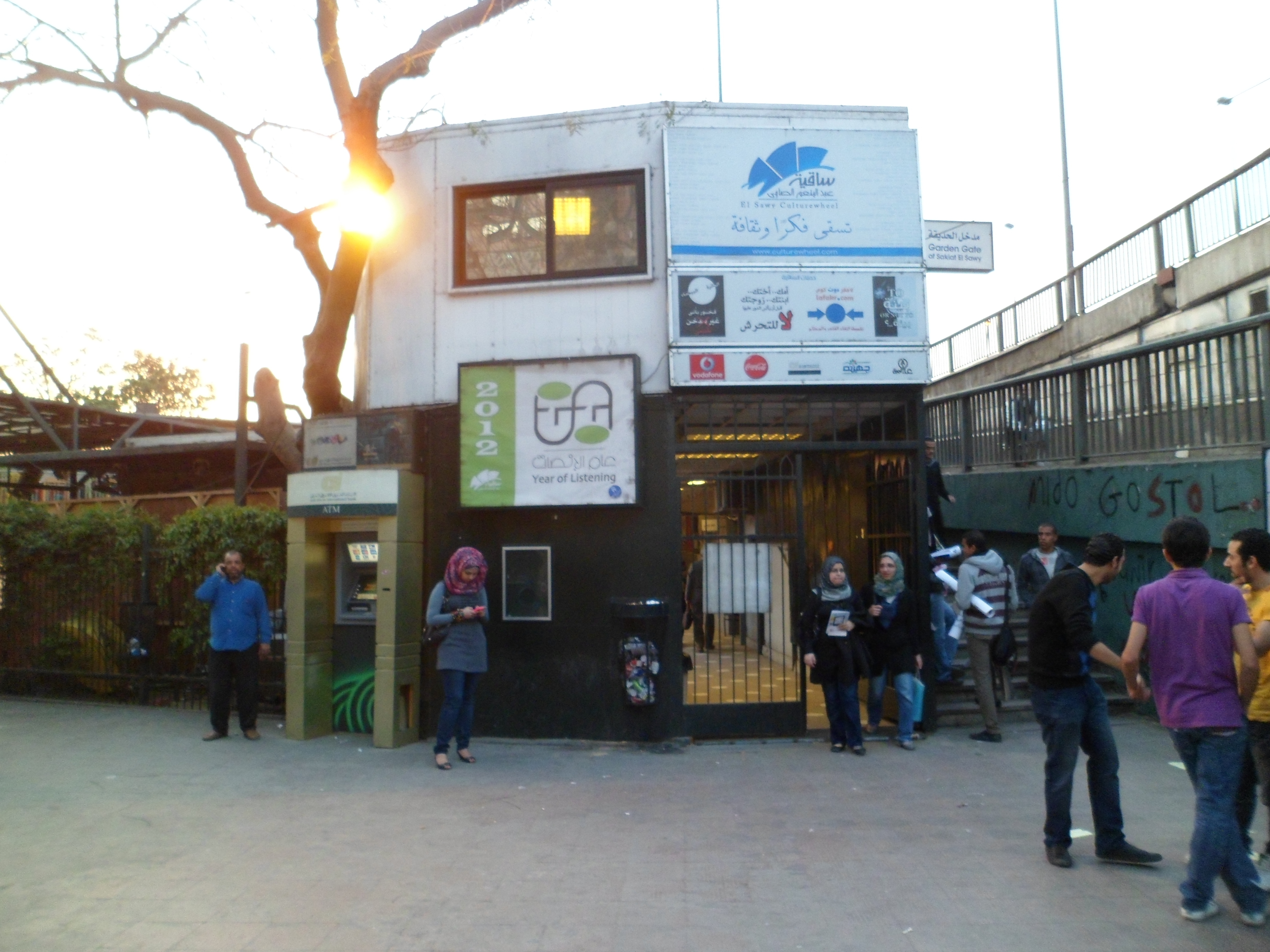 ساقية الصاوي